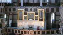 Orgel der Evang. Friedenskirche Jawor (PL)